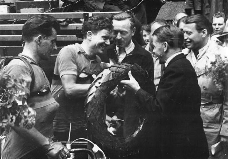 Paul Dinter, Bernhard Trefflich, Hecklau Zentralbild Siegert 1.6.1953 Erster Lauf der DDR-Meisterschaft im Straßenfahren Am 31.5.1953 wurde von Riesa aus der erste Lauf der Meisterschaften der Deutschen Demokratischen Republik im Straßenfahren ausgetragen. Im Anschluß an das Rennen besichtigten die Meister des Sportes Lothar Meister, Bernhard Trefflich, Gustav-Adolf Schur und Paul Dinter auf Einladung des Werkleiters, Held der Arbeit, Max Friedemann das Stahl- und Walzwerk Riesa. UBz: Der Sieger des Rennens, Bernhard Trefflich, erhält vom Referenten für Radsport bei der Staatlichen Kommission für Körperkultur und Sport, Hecklau, den Siegerkranz. Links, Paul Dinter, der Zweiter wurde.